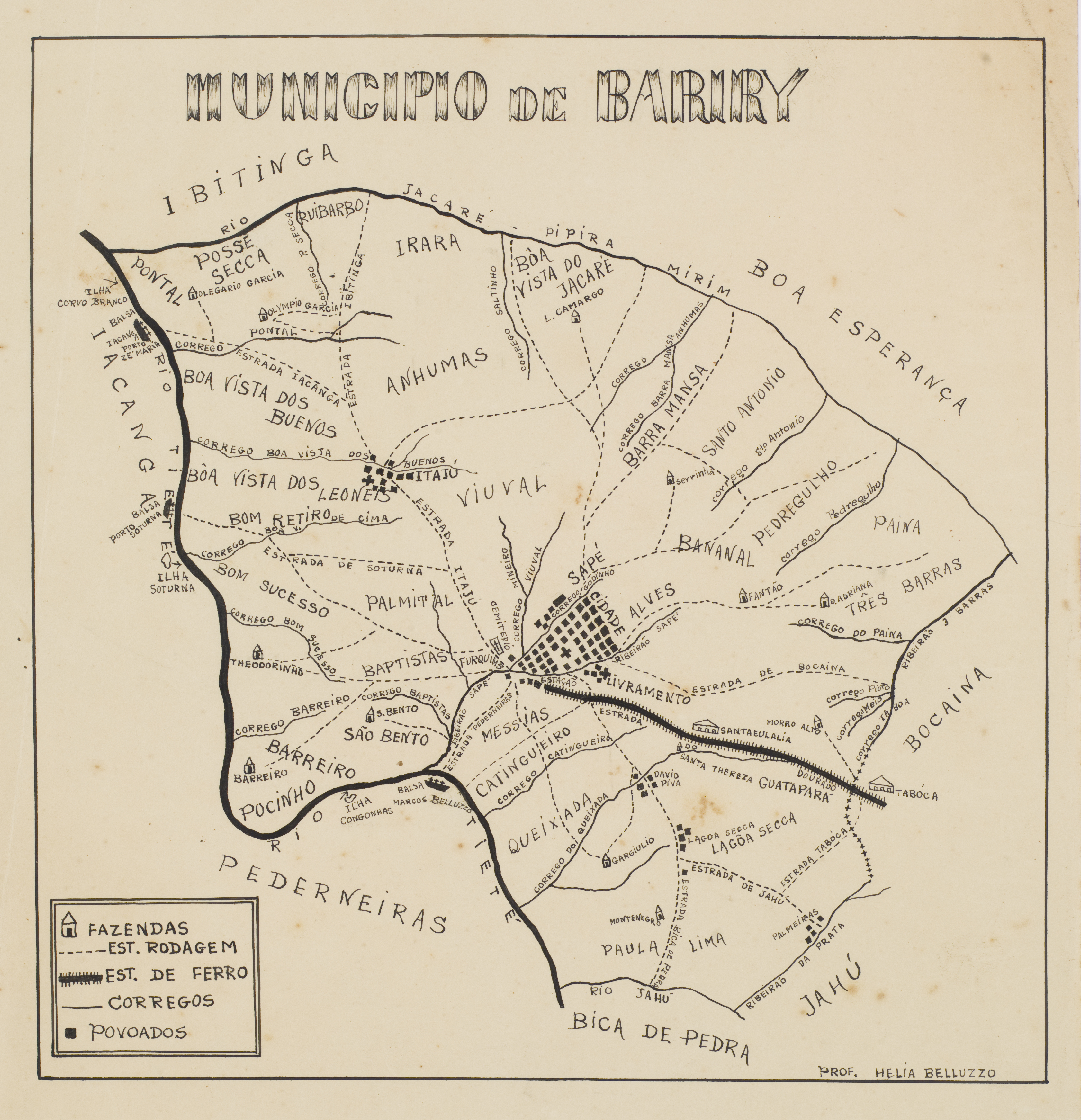 Obra que integra o acervo do Museu Paulista da USP. Coleção João Baptista de Campos Aguirra